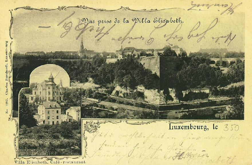 Luxembourg, ancien café-restaurant dans la Villa Elisabeth (vers 1900)